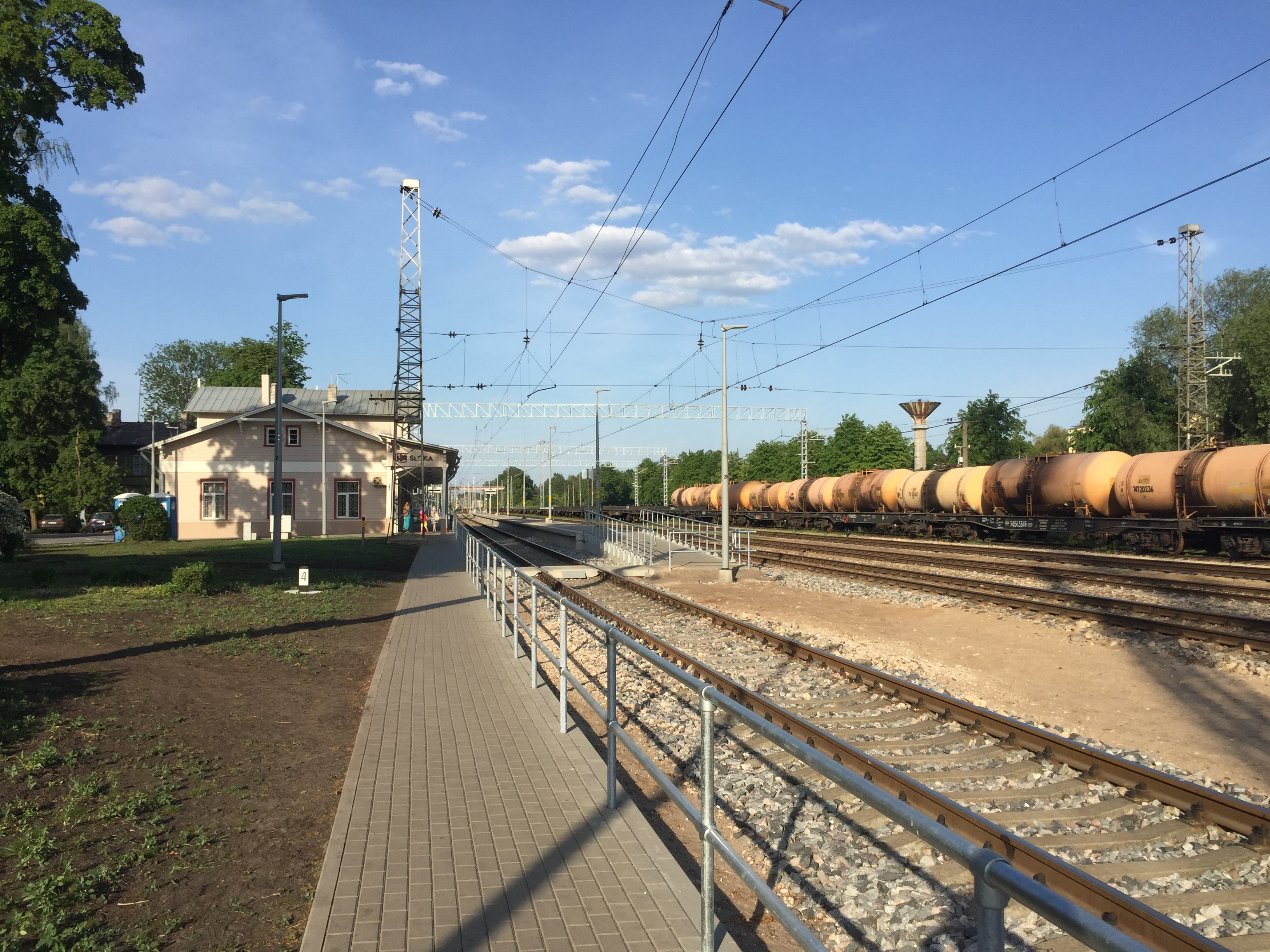 Slokas stacijas ēka, peroni un sliežu ceļi 2016. gadā